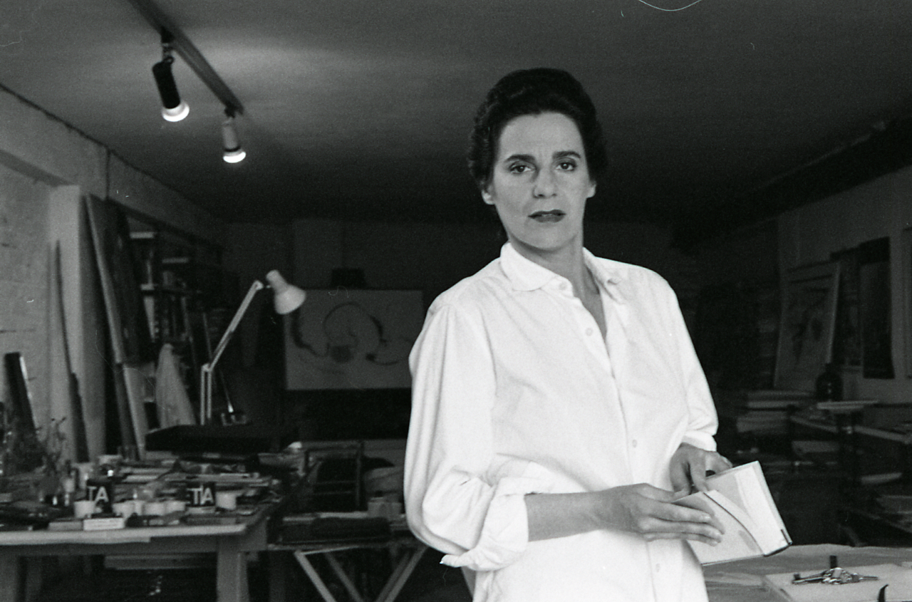 Servizio fotografico : Venezia, 1981 / Paolo Monti. - Strisce: 2, Fotogrammi complessivi: 11 : Negativo b/n, gelatina bromuro d'argento/ pellicola ; 35 mm. - ((Sul portanegativi: N[I]K[MA]T HP5 e iscrizione: "Venezia - studio di Ziva Kraus 1-11". - La serie è identificata da Monti con segni grafici e distinta dalla successiva. - Occasione: Seminario di fotografia a Palazzo Fortuny e Documentazione per la pubblicazione: Crivellari Domenico (a cura di), Venezia, Milano, Electa, 1982. - Fonte: Agenda di Paolo Monti: Nikon Leika 3001-/ Monti 1978 (1978-1982), presso Archivio Paolo Monti. - Fonte: Monografia di Crivellari Domenico (a cura di): Venezia, Milano, Electa (1982)